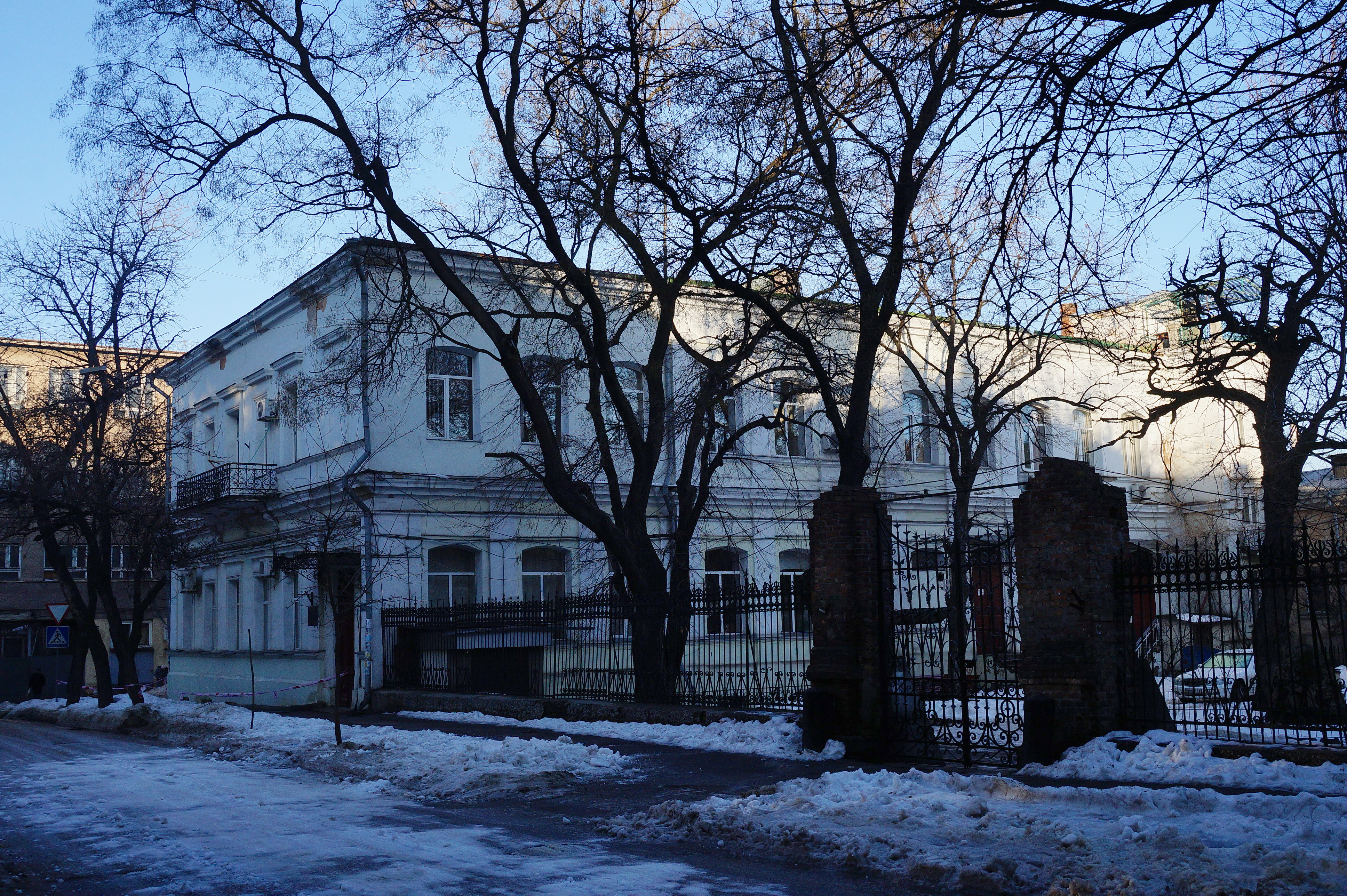 Будинок Діалігмено, Одеса, вул. Канатна, 3 / пров. Нахімова